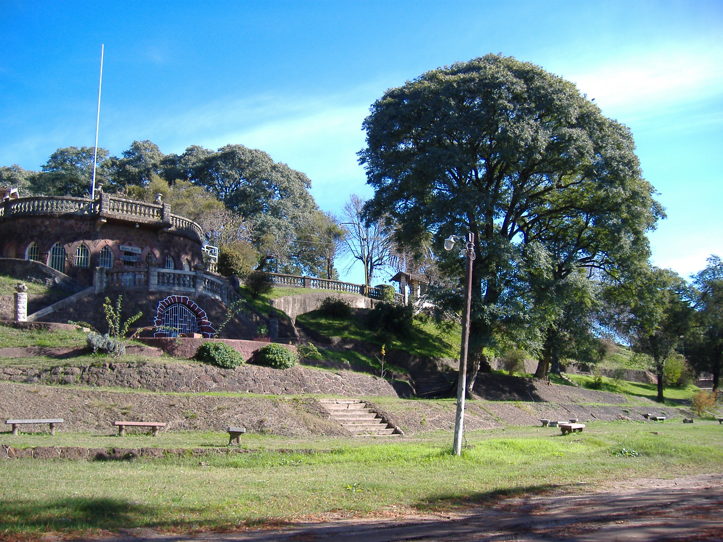 Quirós Park, in Colón, Entre Ríos, Argentina.